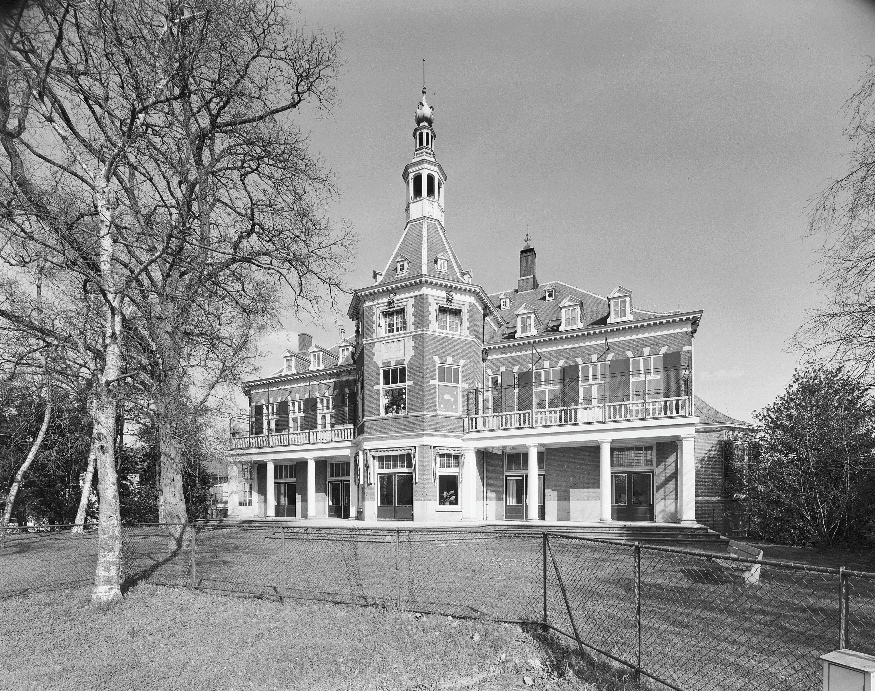 Veldheim: Voorgevel (opmerking: Gefotografeerd voor De Utrechtse Heuvelrug)